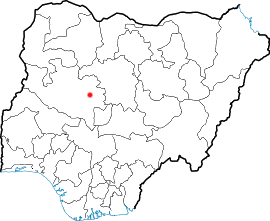 Localização de Minna na Nigéria.